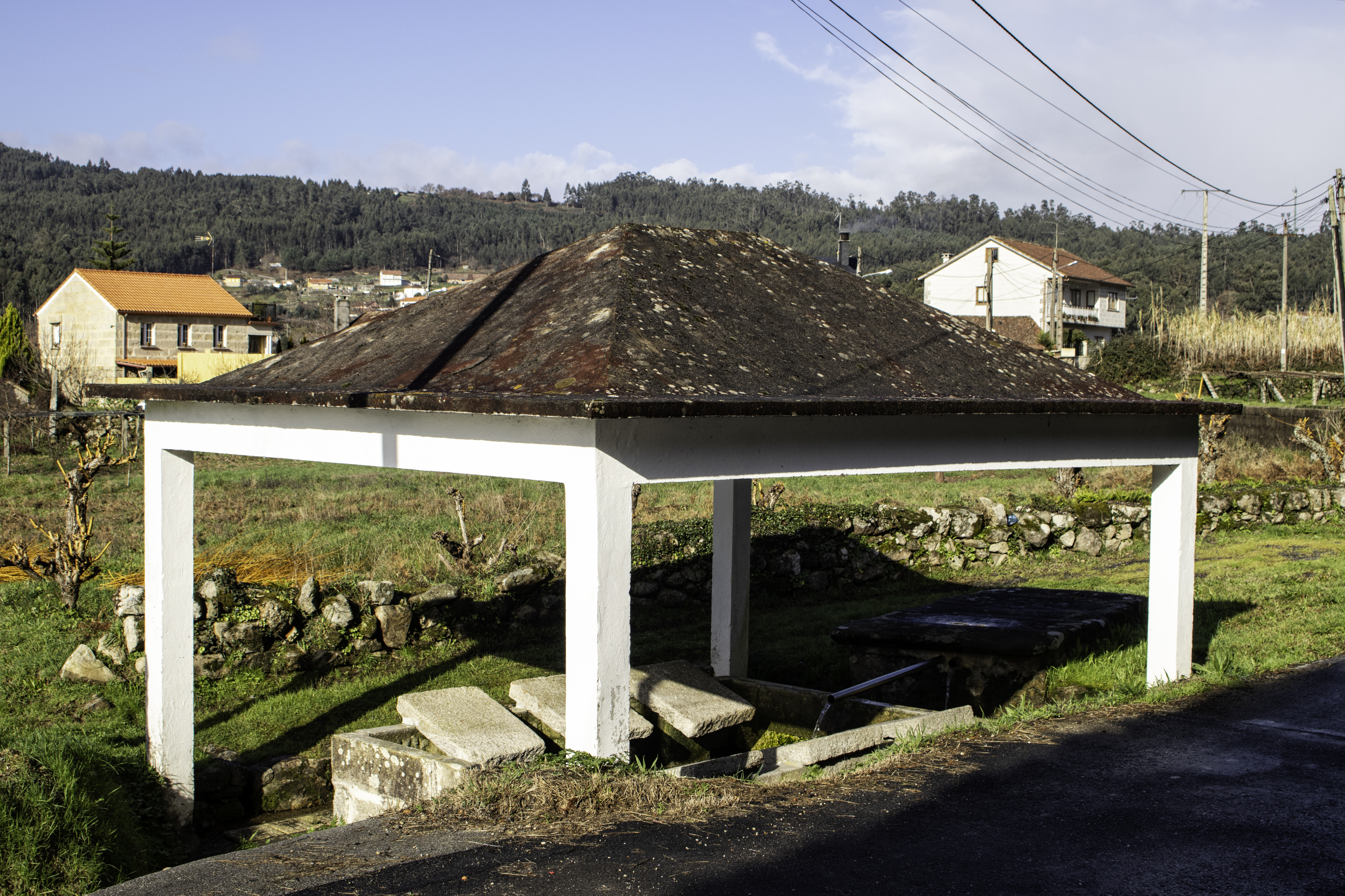 Lavadoiro de Reariz, Pontevedra.